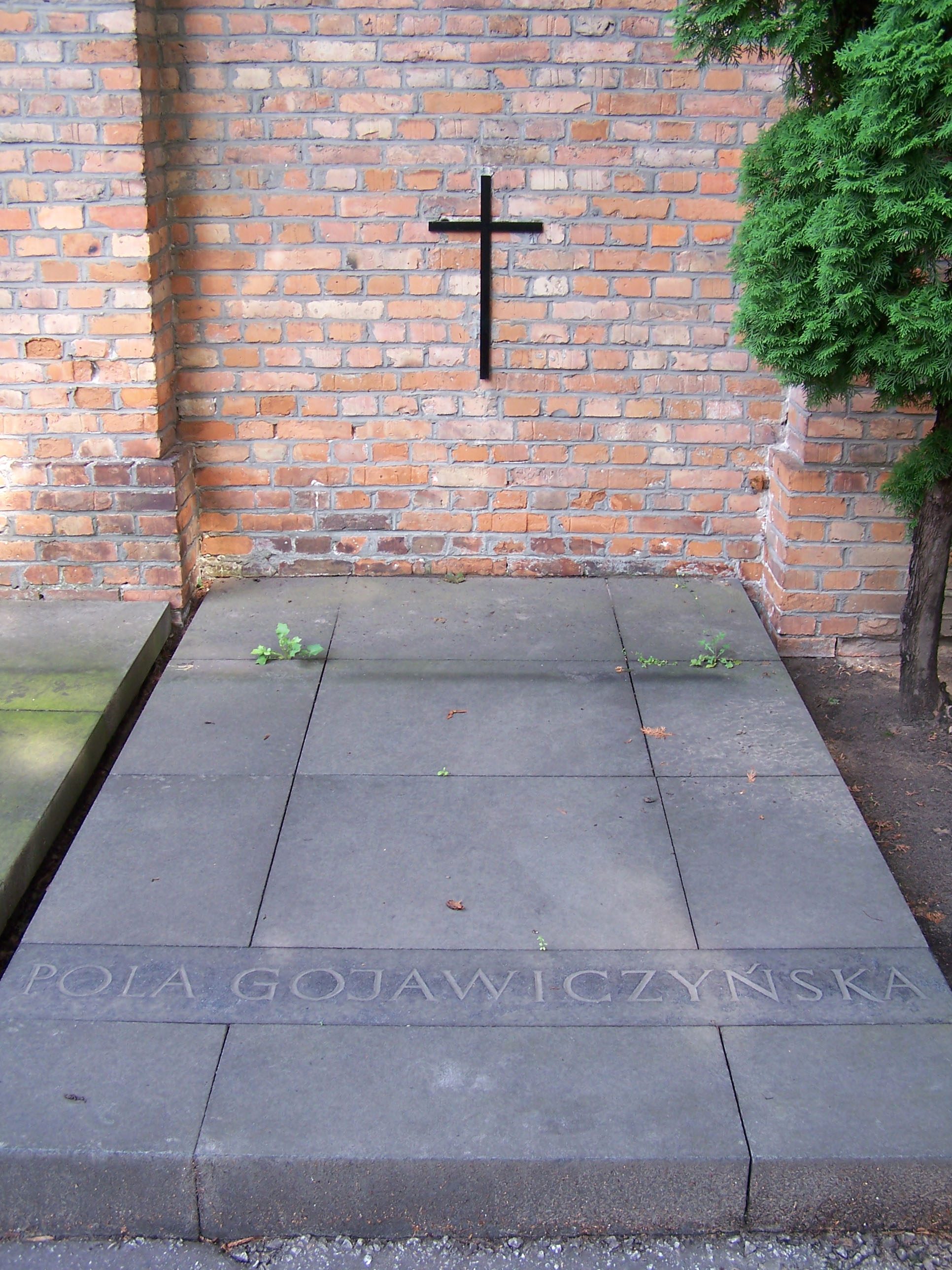 Grave of writer Pola Gojawiczyńska at Powązki Cemetery in Warsaw, Poland